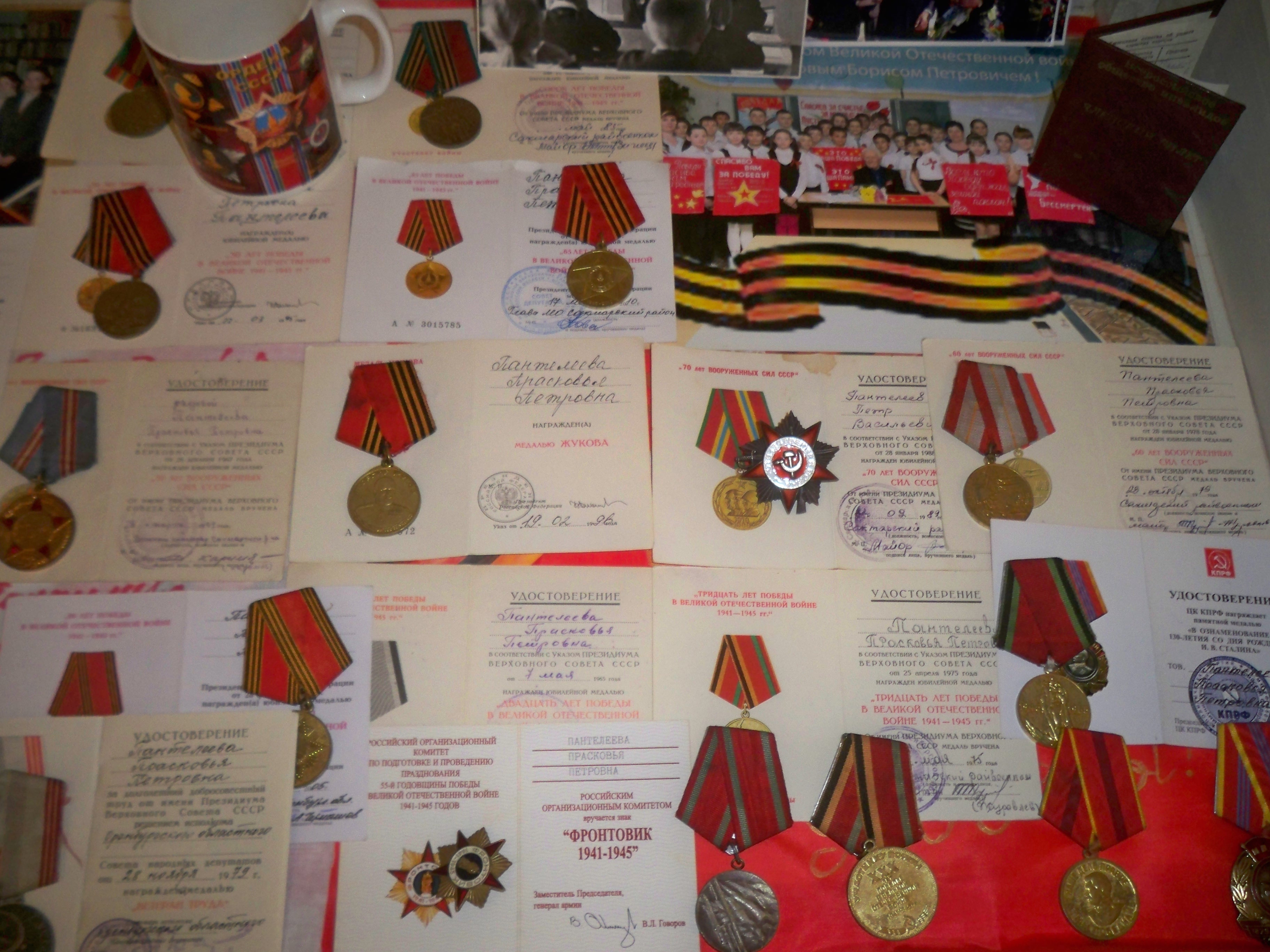 Beberapa anugerah Panteleeva P.P.